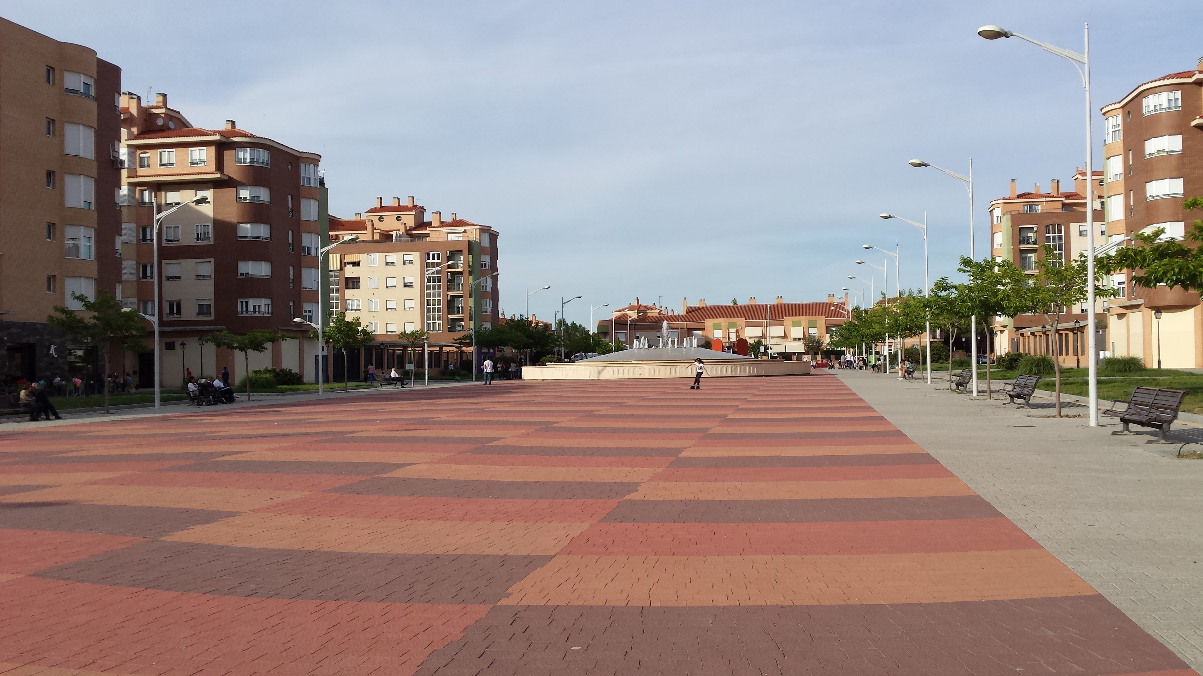 Plaza de Los Llanos del Águila. Albacete